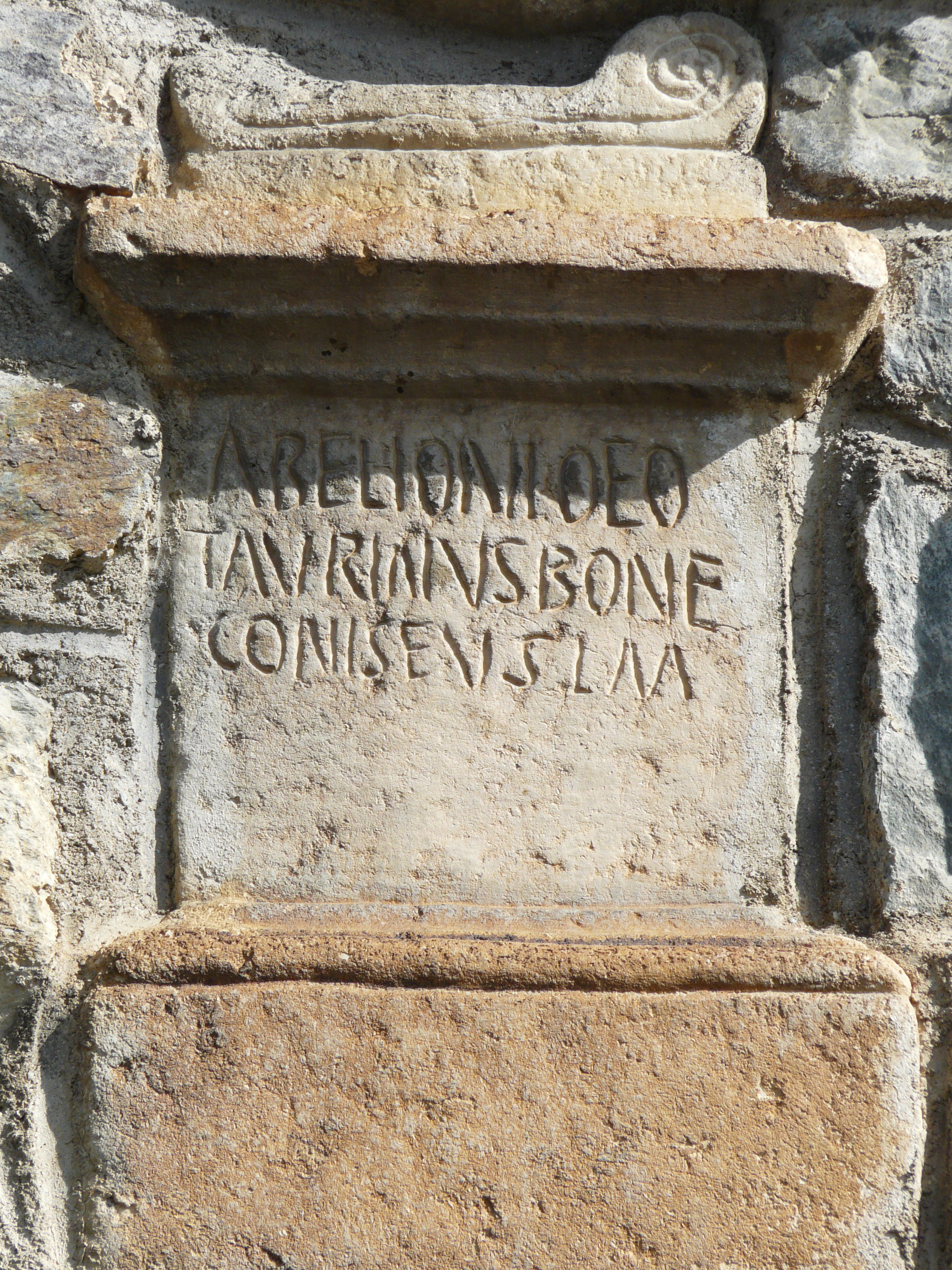 Autel votif (Ier au IVème siècle après JC), dédié au dieu Abellio. Utilisé en remploi dans la maçonnerie de l'église de Saint-Aventin (Haute-Garonne, France). L'inscription "Abelioni deo / Taurinus Bone/conis f(ilius) / v(otum) s(olvit) l(ibens) m(erito)" ("Au dieu Abelio(n), Taurinus, fils de Boneconis, s'est acquitté de son vœu de bon gré comme il se doit.") est mentionnée dans le CIL XIII sous le n° 338.